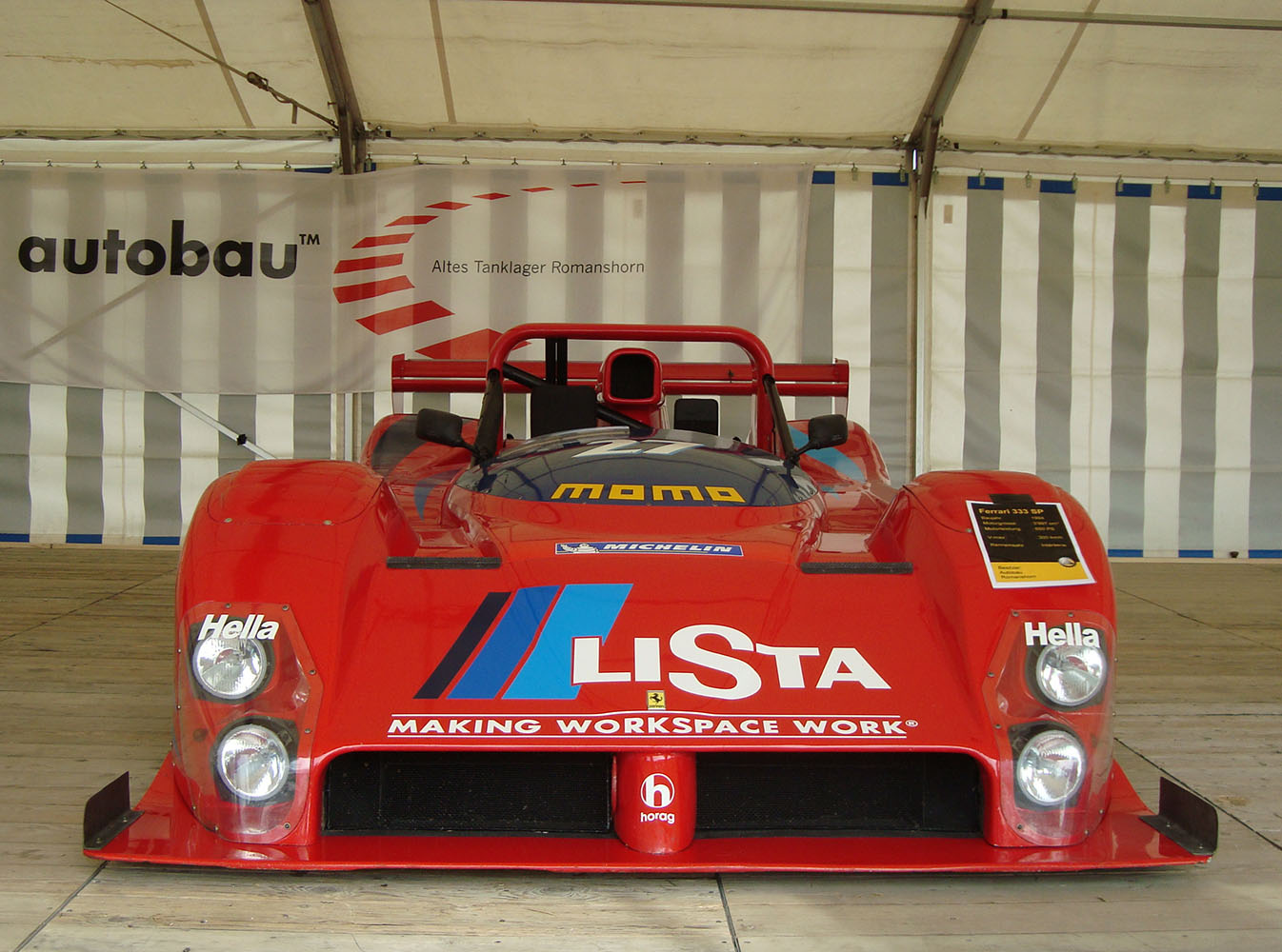 Ferrari 333 SP, Fredy Lienhard, Mauro Baldi, Didier Theys, Arie Luyendyk, Sportwagen-Prototyp, Lista Racing Team